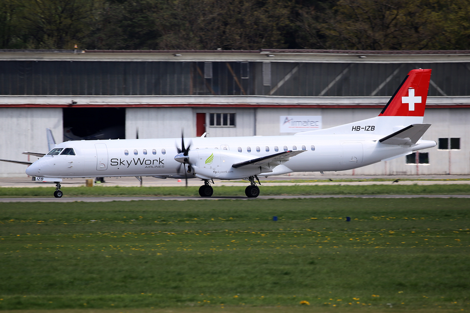 Bern - Belp (Belpmoos) (BRN / LSZB) Schweiz - Switzerland 4.2017 First Flight 5.1993 Del. 10.1994 to Crossair HB-IZB Swiss International Airlines OLT D-AOLB OLT Express D-AOLB Braathens Regional SE-MFK SkyWork Airlines HB-IZB (PICTURE)